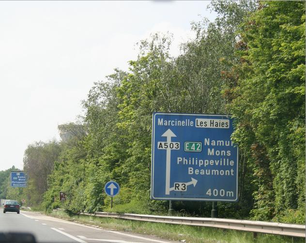 Échangeur entre la A503 et le ring de Charleroi par Vascer